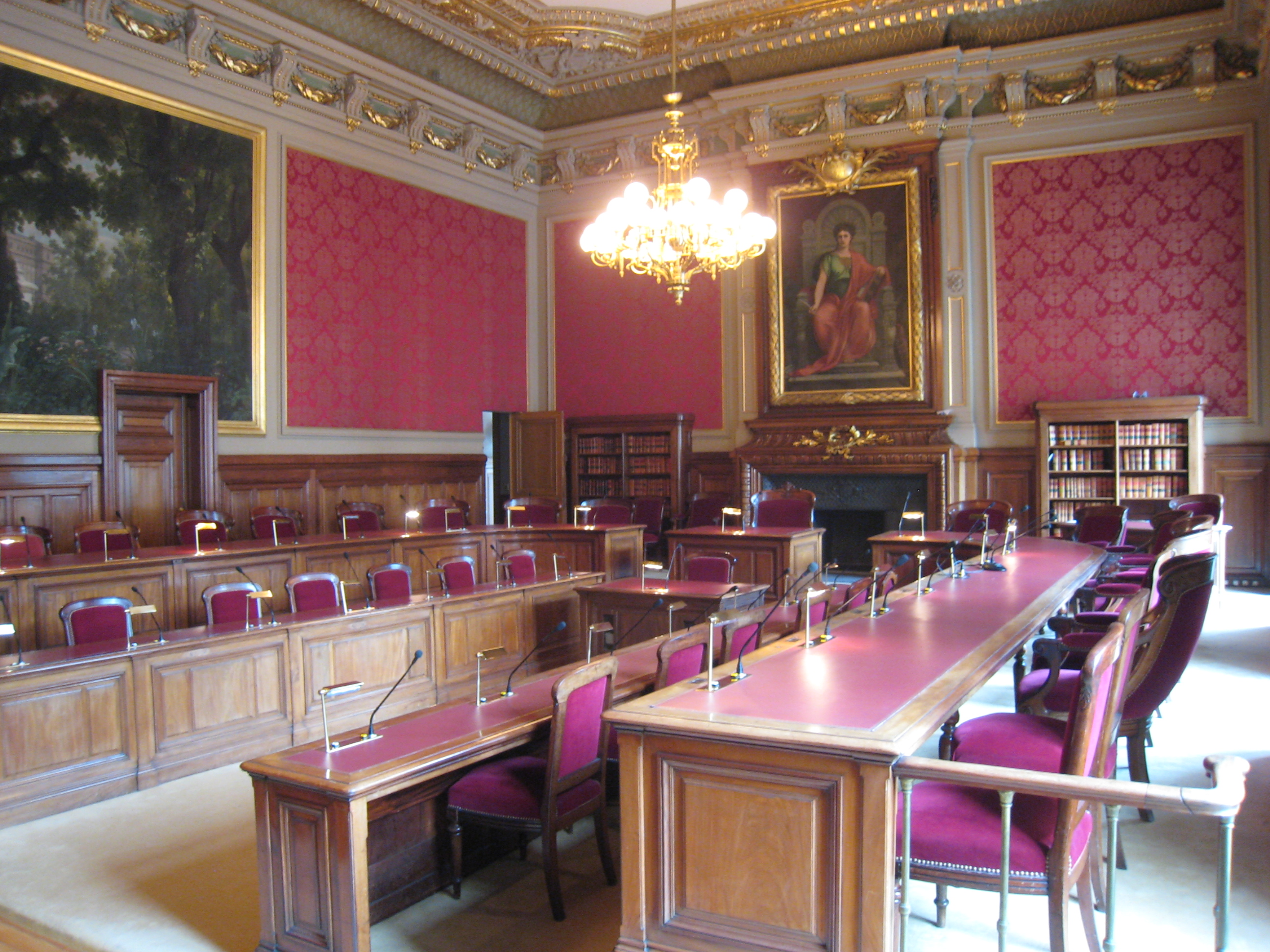 Conseil d'État, salle du contentieux (Journées du Patrimoine 2009)